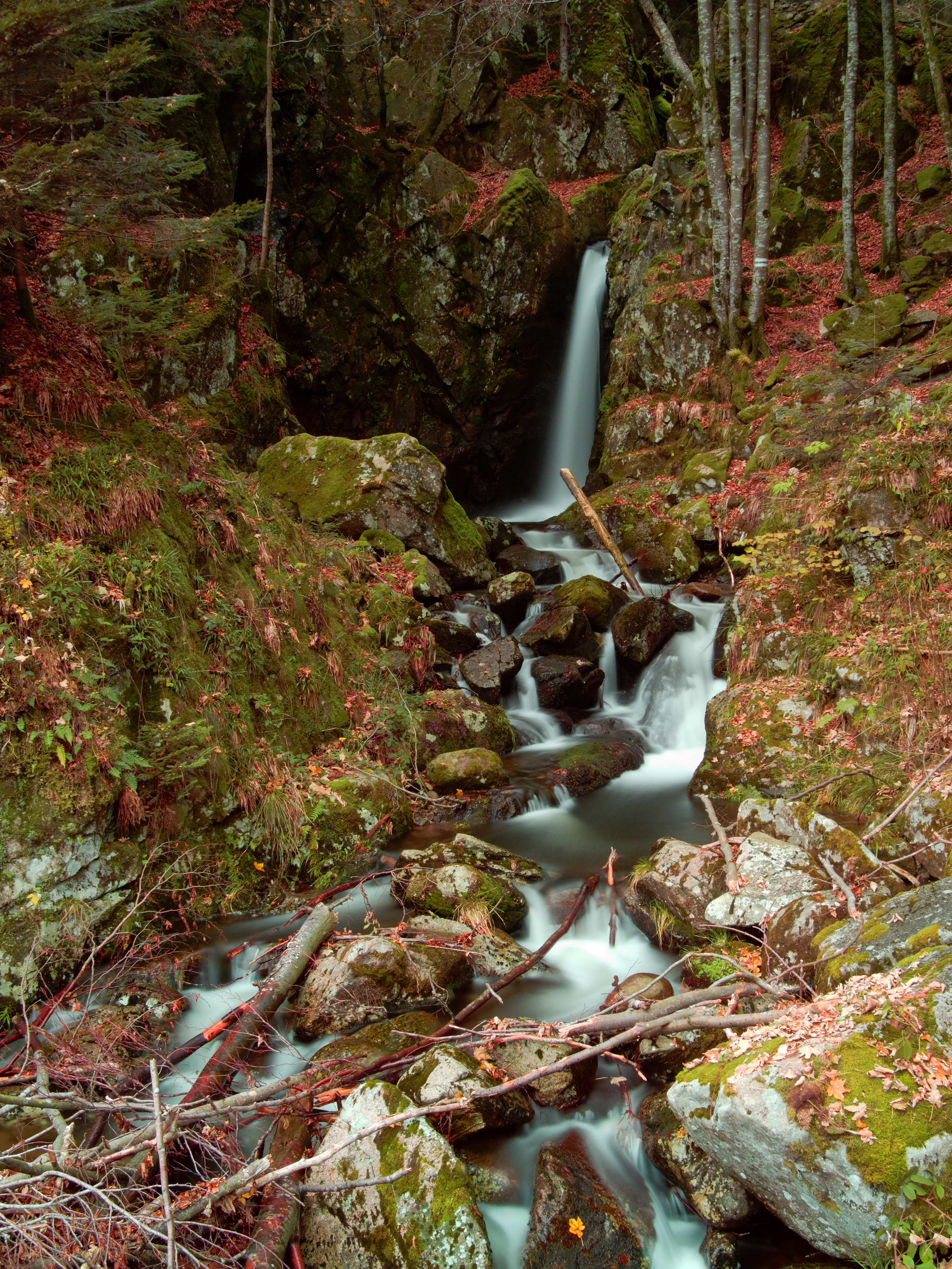 Cascade du Saut de la Truite, à Lepuix. Photo réalisée avec un filtre ND16.